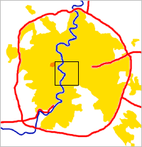 Overzicht Rome met locatie heuvelgebied. Eigen werk.